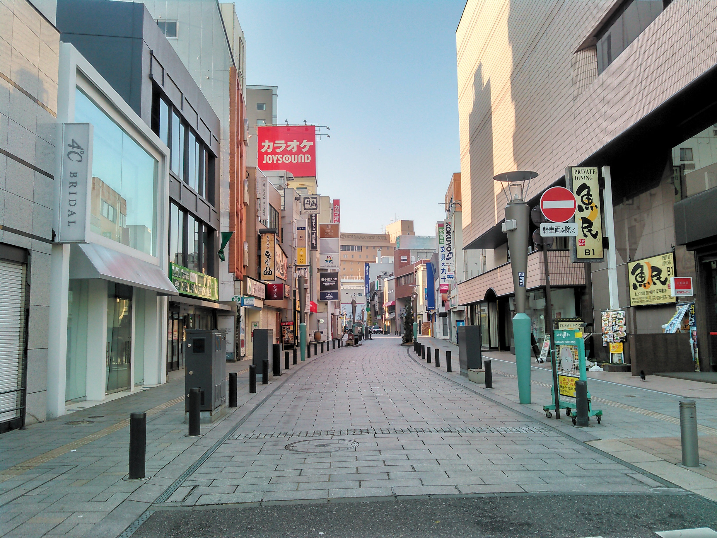 郡山なかまち夢通り入口